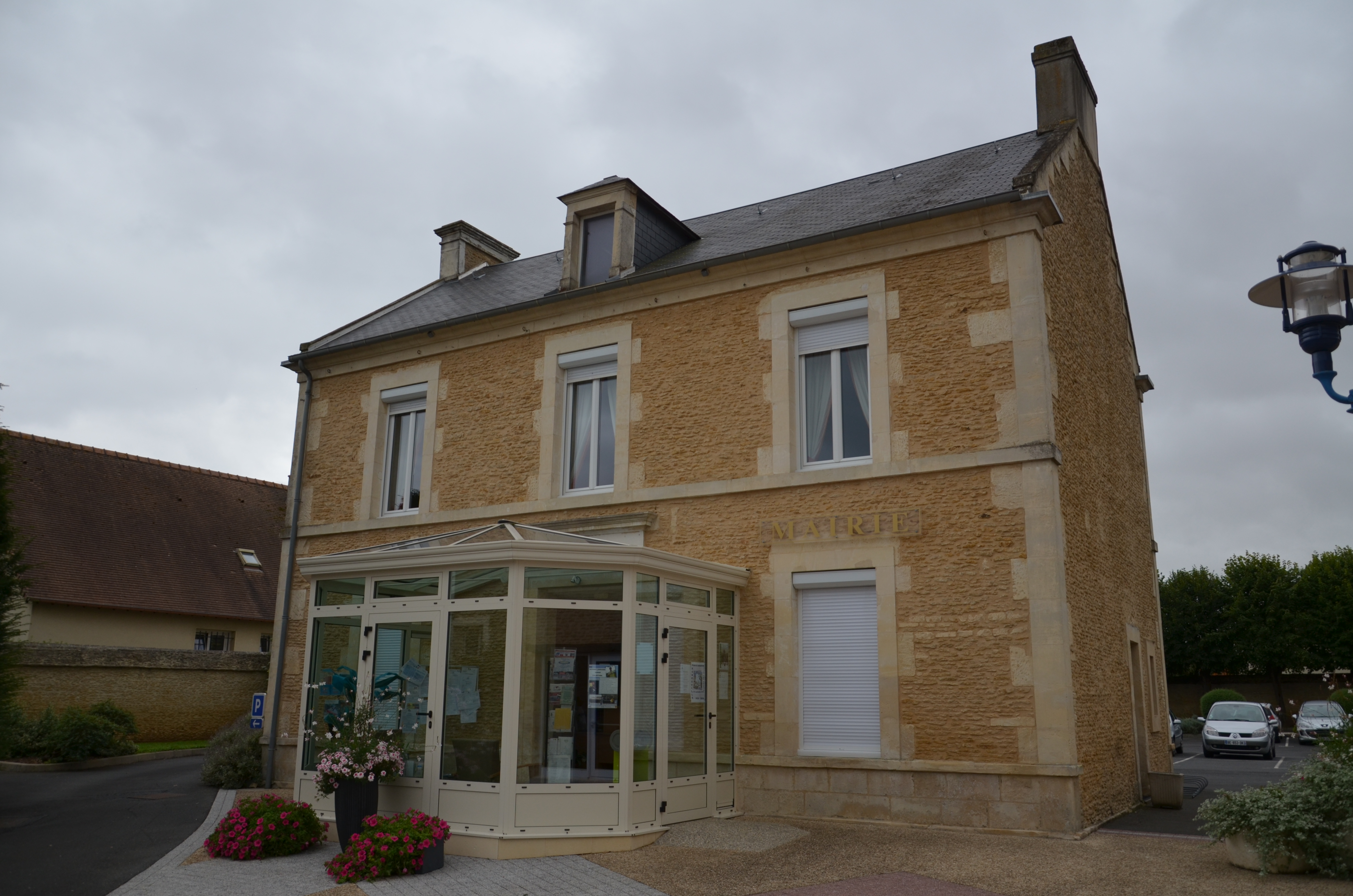 Mairie de Frénouville.